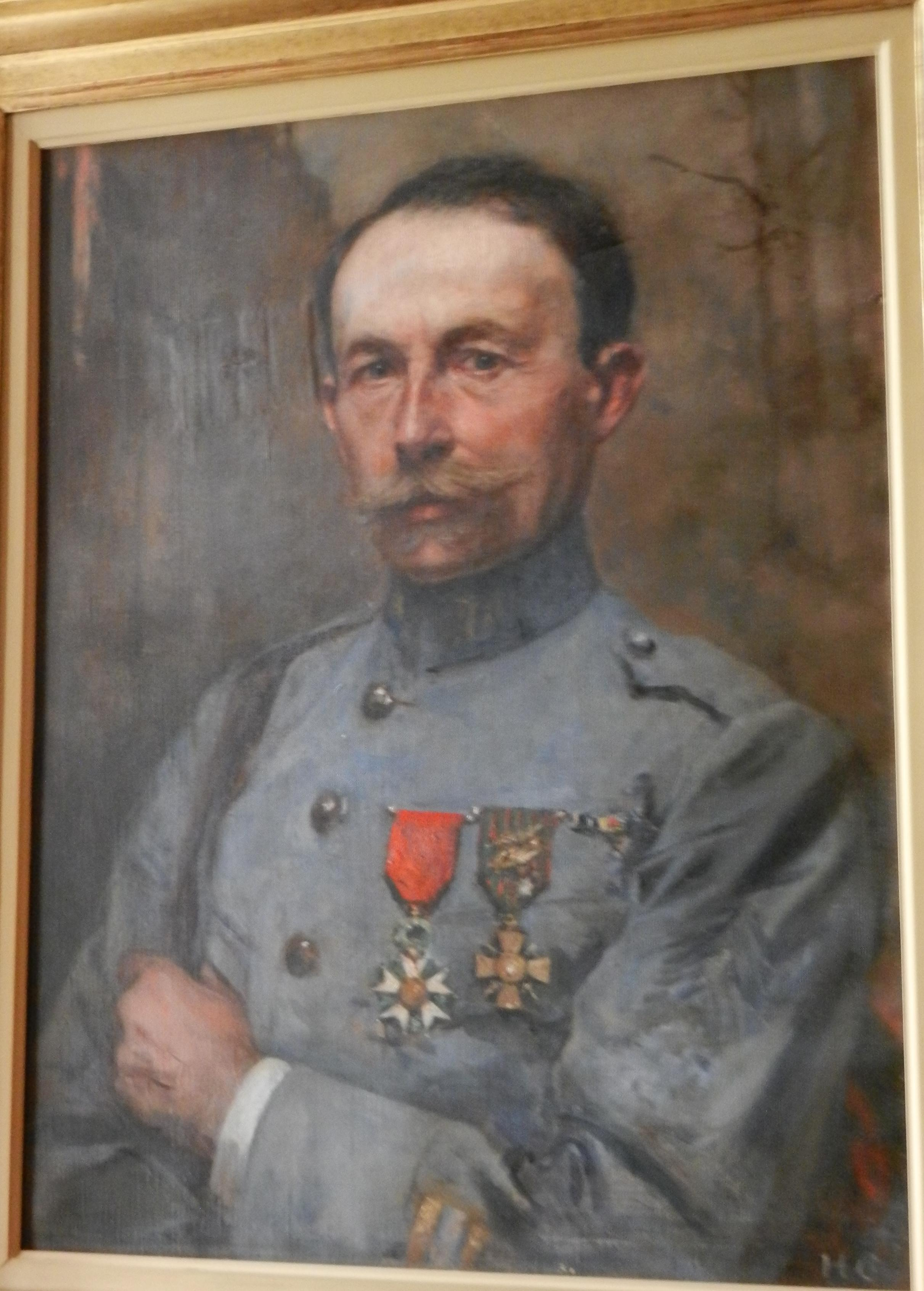 Portrait de Léonce Vieljeux en tenu d'officier à la fin de la première guerre mondiale. Tableau situé dans le cabinet de Jean Guiton à l'Hôtel de ville de La Rochelle.